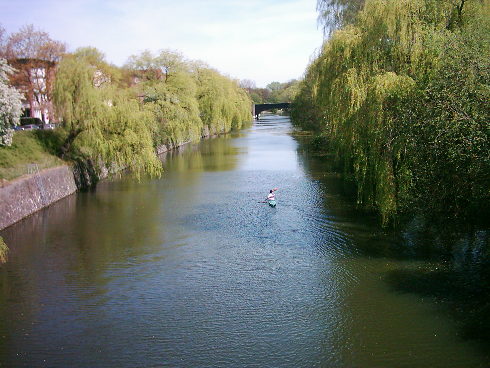 Der Eilbekkanal in Hamburg. Blick Richtung Osten (Wandsbek).